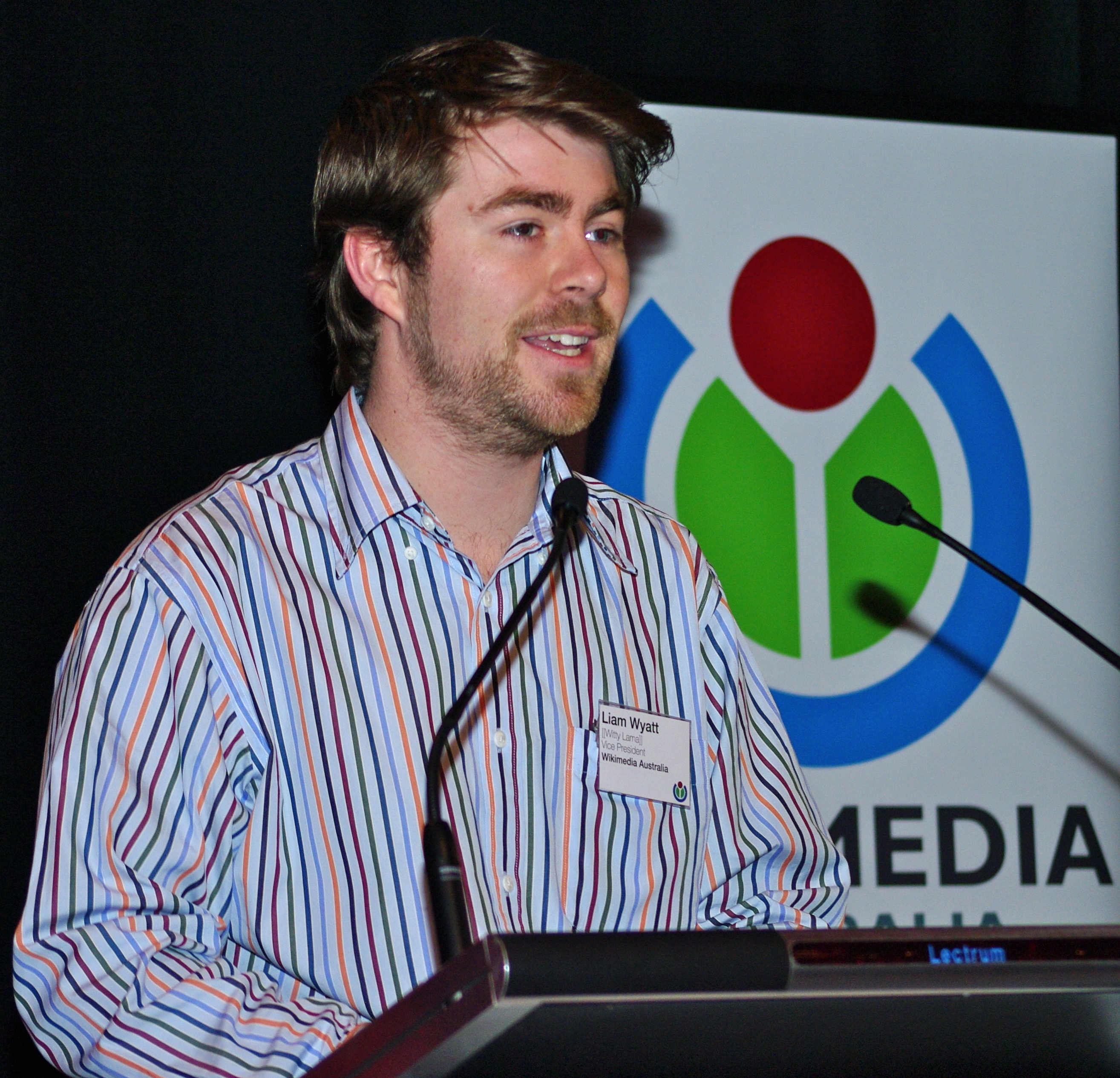 GLAM-Wiki Canberra 09